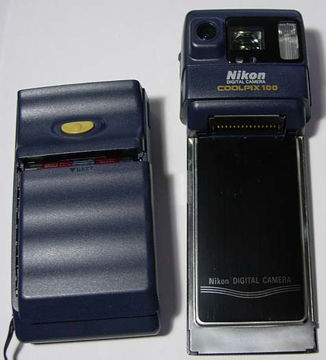 Appareil photographique numérique Nikon Coolpix 100